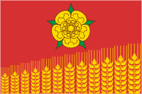 Флаг Красносельского сельского поселения Кущёвского района Краснодарского края, Россия.